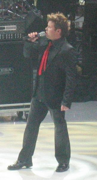 Janne Kataja in Hartwall Arena 12.9.07